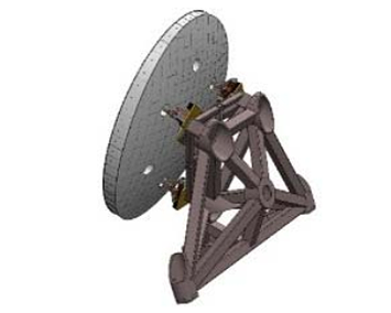 E-ELT-M5-mirror 2.7x2.1-m Flat Passive + Fast Tip/Til